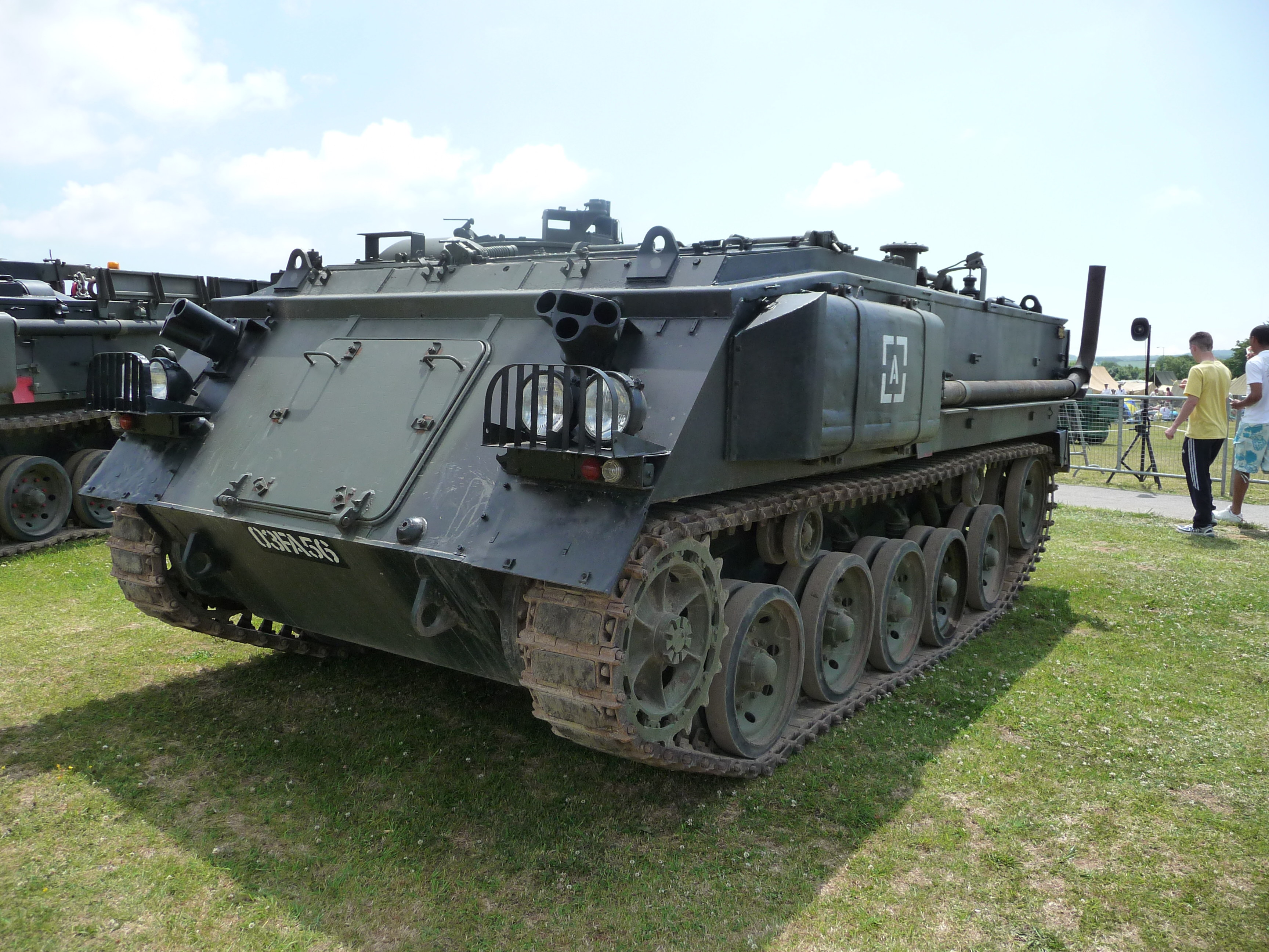 APC